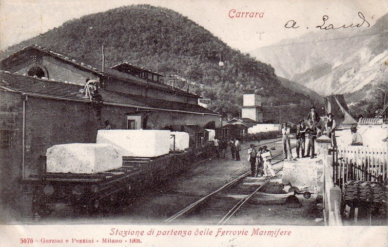 Stazione di Carrara Monterosso, scalo di partenza della ferrovia Marmifera di Carrara nel 1908 – Italia.